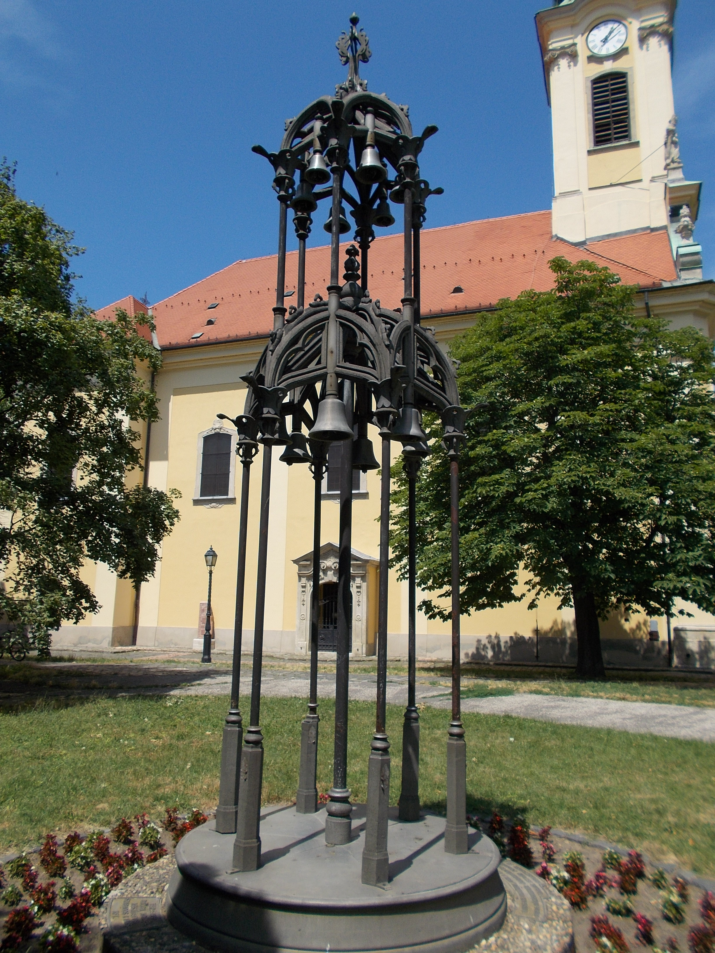 Harangjáték (Baliga Kornél, 1992) háttérben Szent Péter és Pál plébániatemplom Műemlék ID 371.- Magyarország, Budapest, III. kerület, Lajos utca 168 This is a photo of a monument in Hungary, Identifier: 371